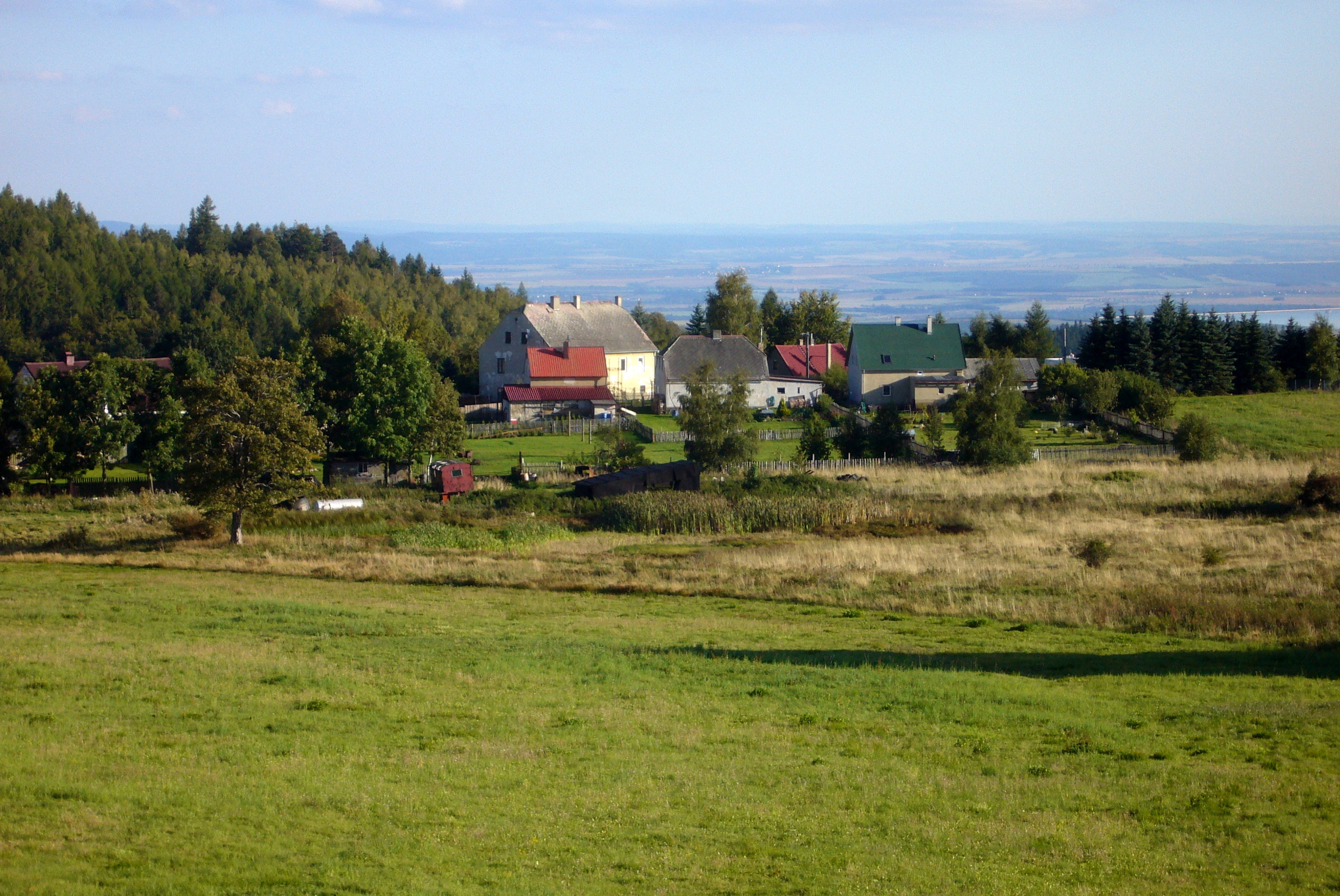 Strážky - pohled ze severozápadu